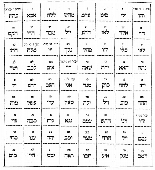 טבלת שם בן עב מתוך קהלת יעקב למברג ה'תר"ל